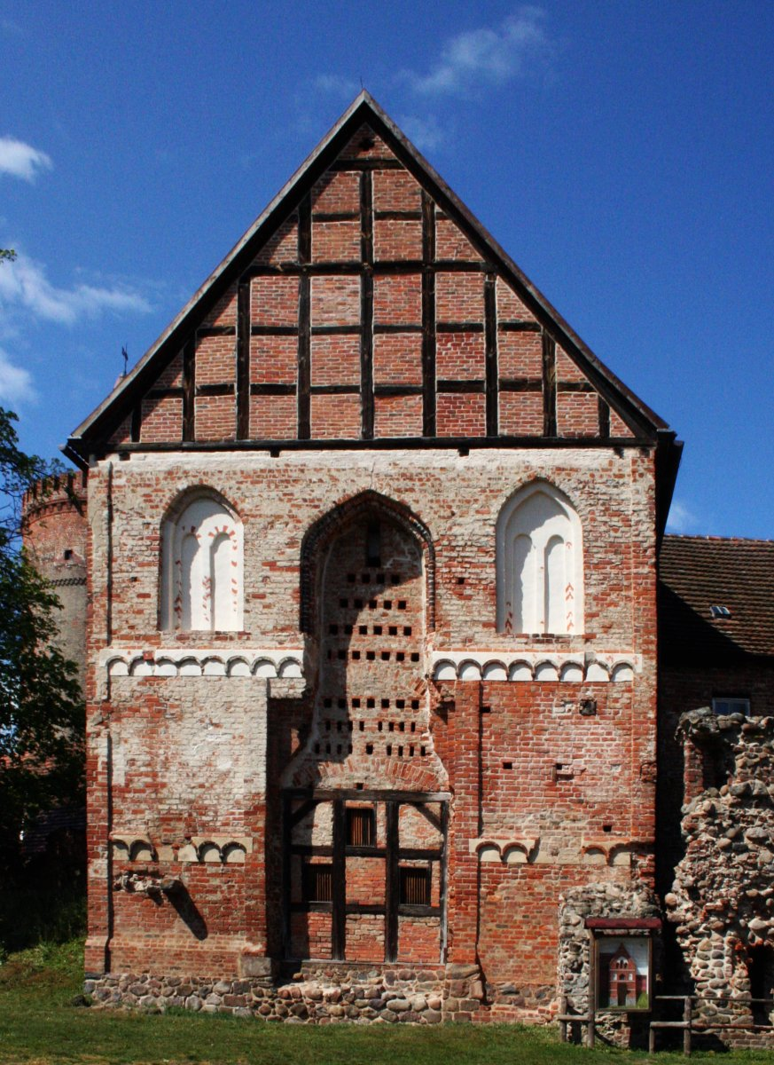 Oberes Tor (Burgkapelle) der Burg Stargard